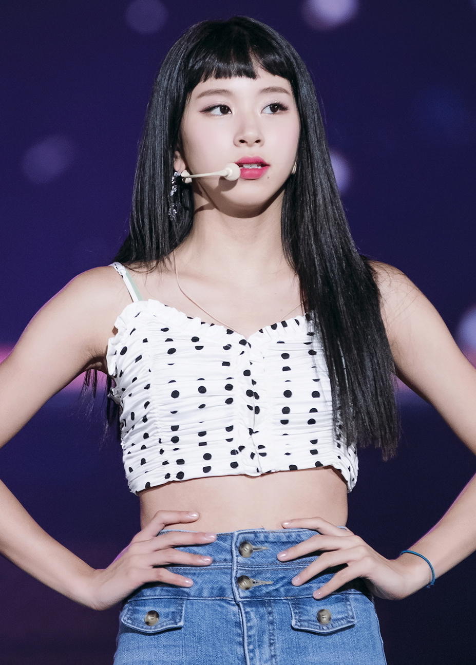 180717 열린음악회 트와이스